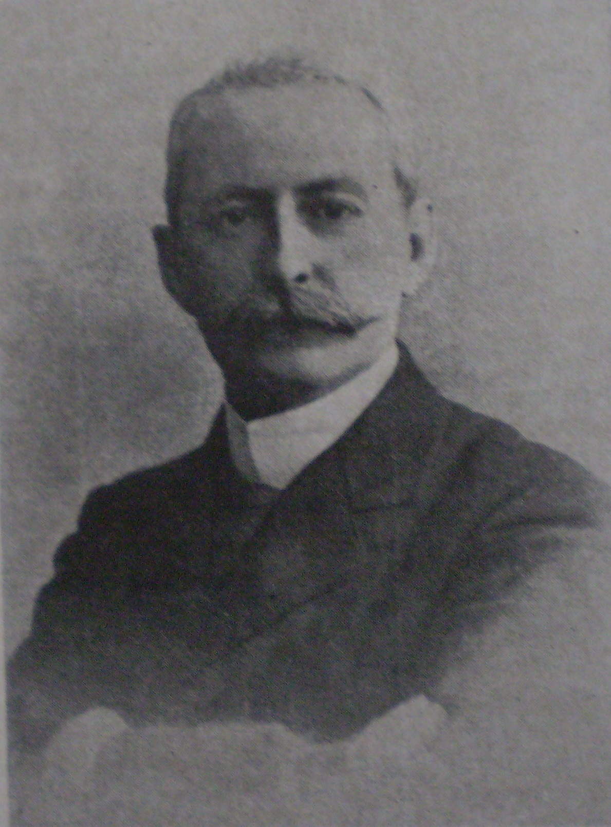 Adolfo Pedro Carranza